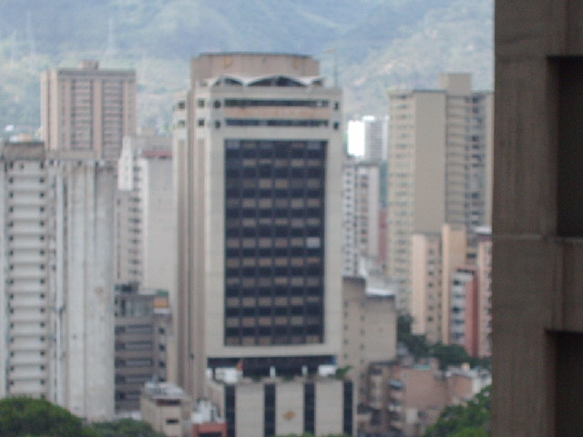 Edificio del Ministerio Publico de Venezuela, en Caracas